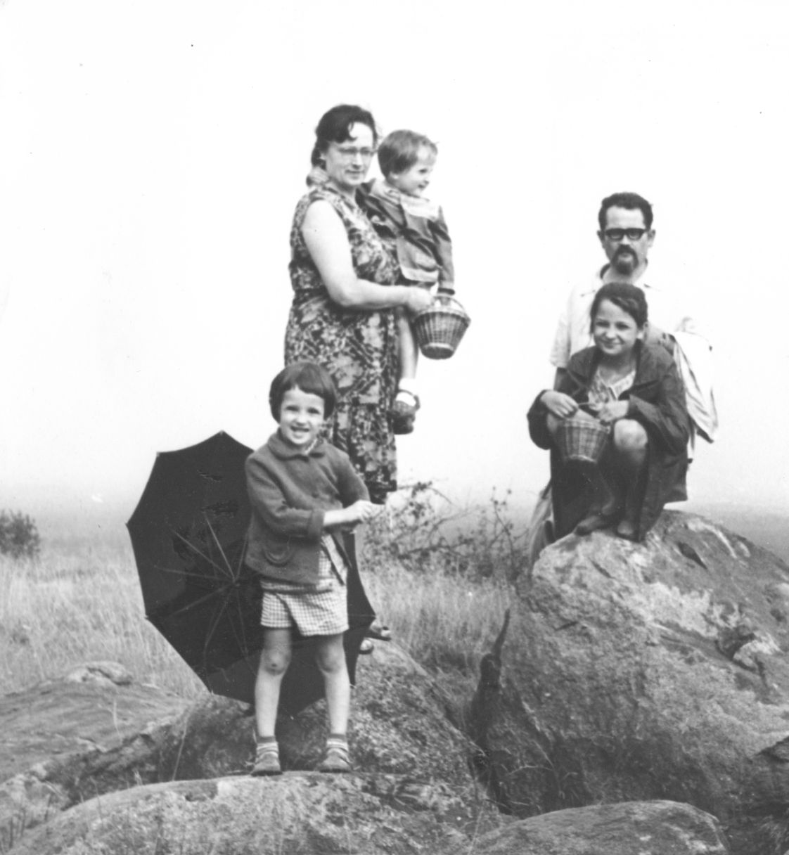 А. И. Зайцев, О. И. Зайцева и их дети Варвара, Николай и Иван